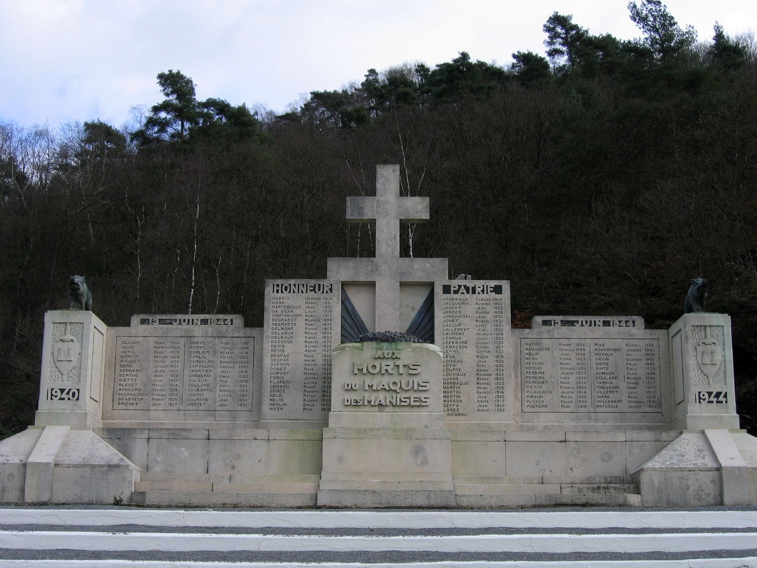 Monuments aux Morts du Maquis des Manises Revin (08)